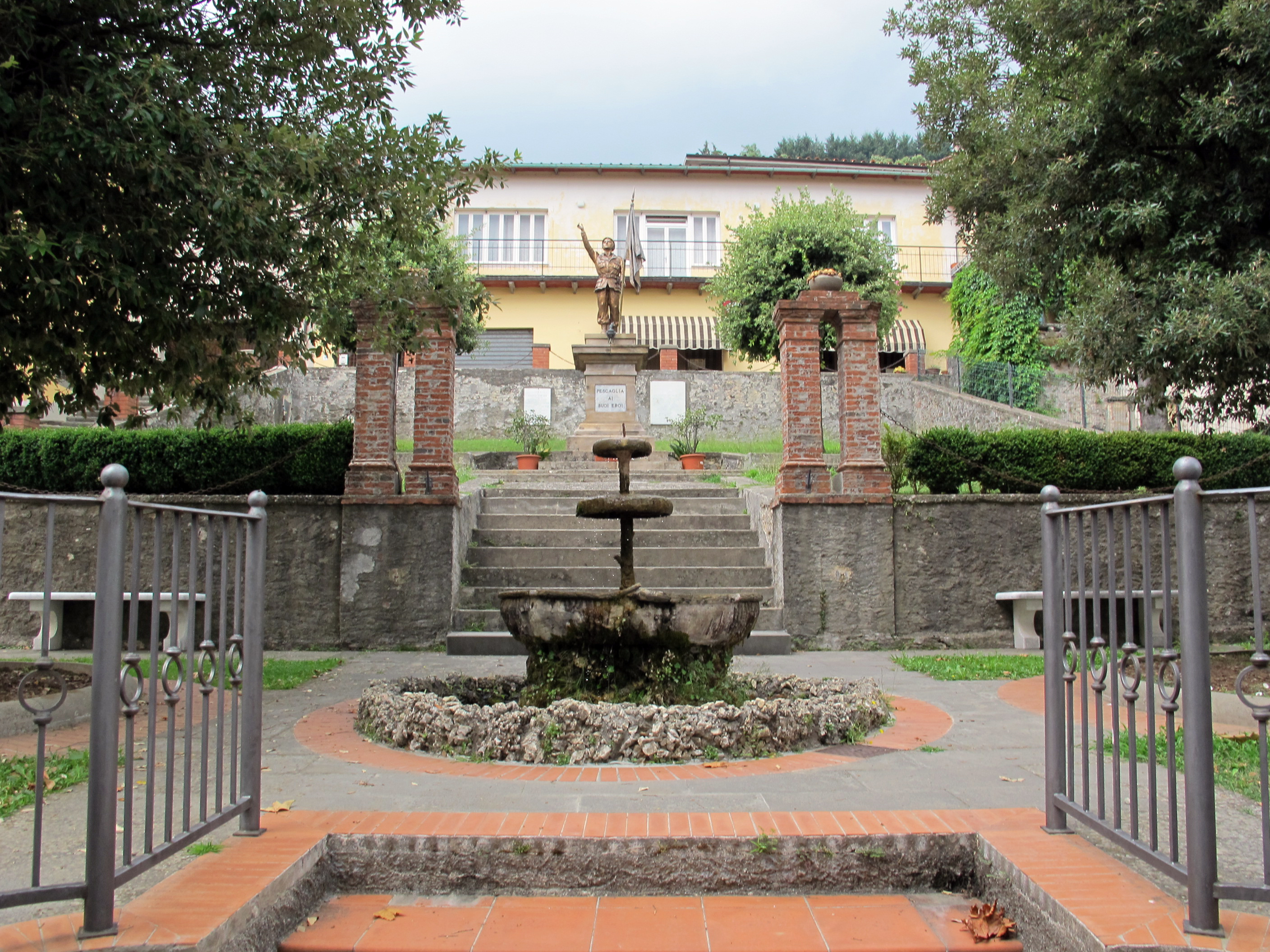 Pescaglia, il Poggio, monumento ai caduti